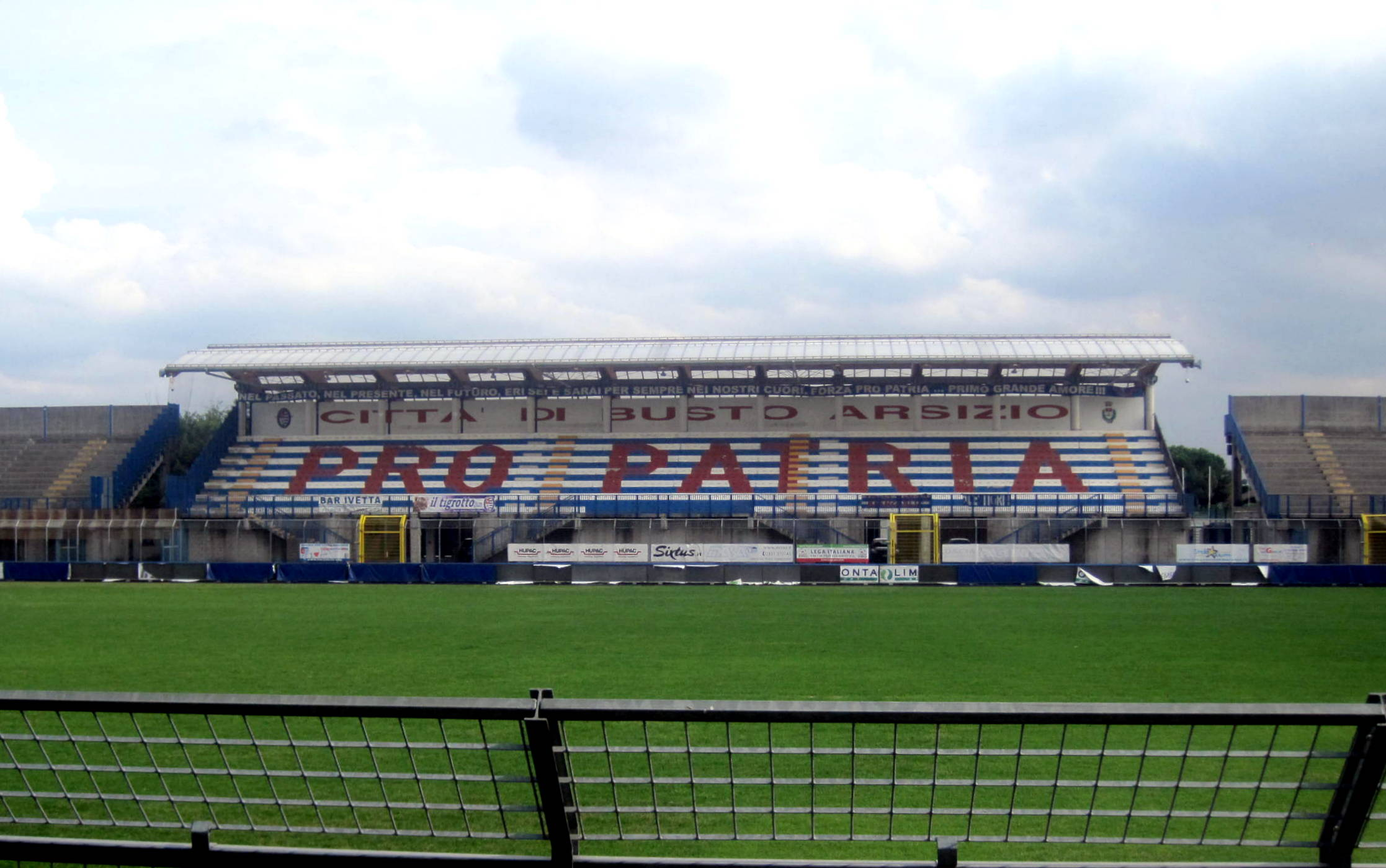 Stadio Carlo Speroni This is a photo of a monument which is part of cultural heritage of Italy.